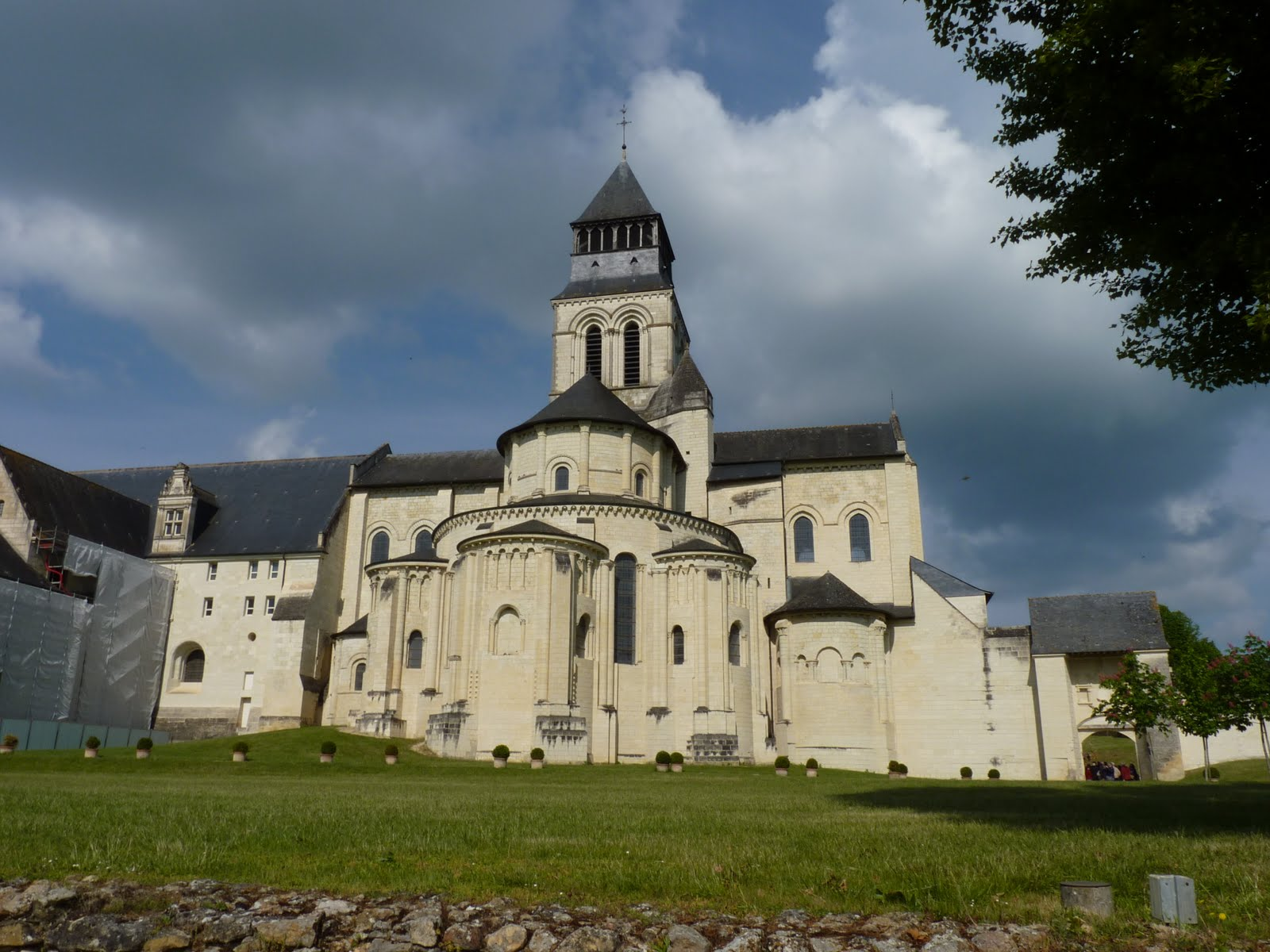 Abbatiale de Fontevraud